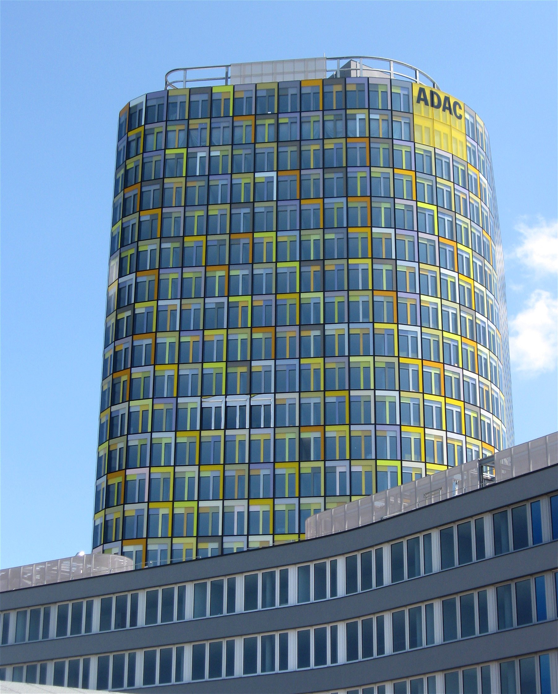 ADAC-Hochhaus, Hansastraße, München